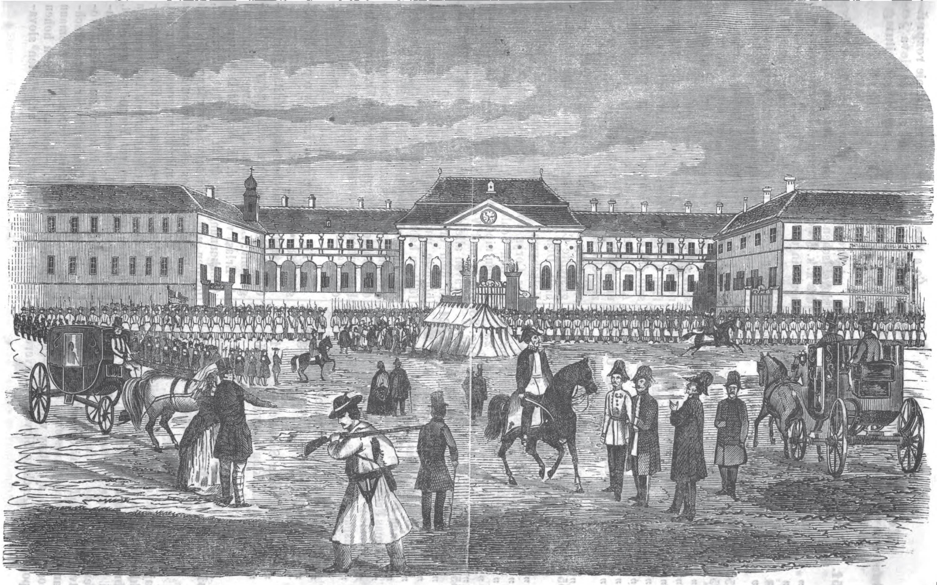 Rozpustenie slovenských dobrovoľníkov na príkaz cisárskeho kr. zboru 21. novembra 1849 v Bratislave.